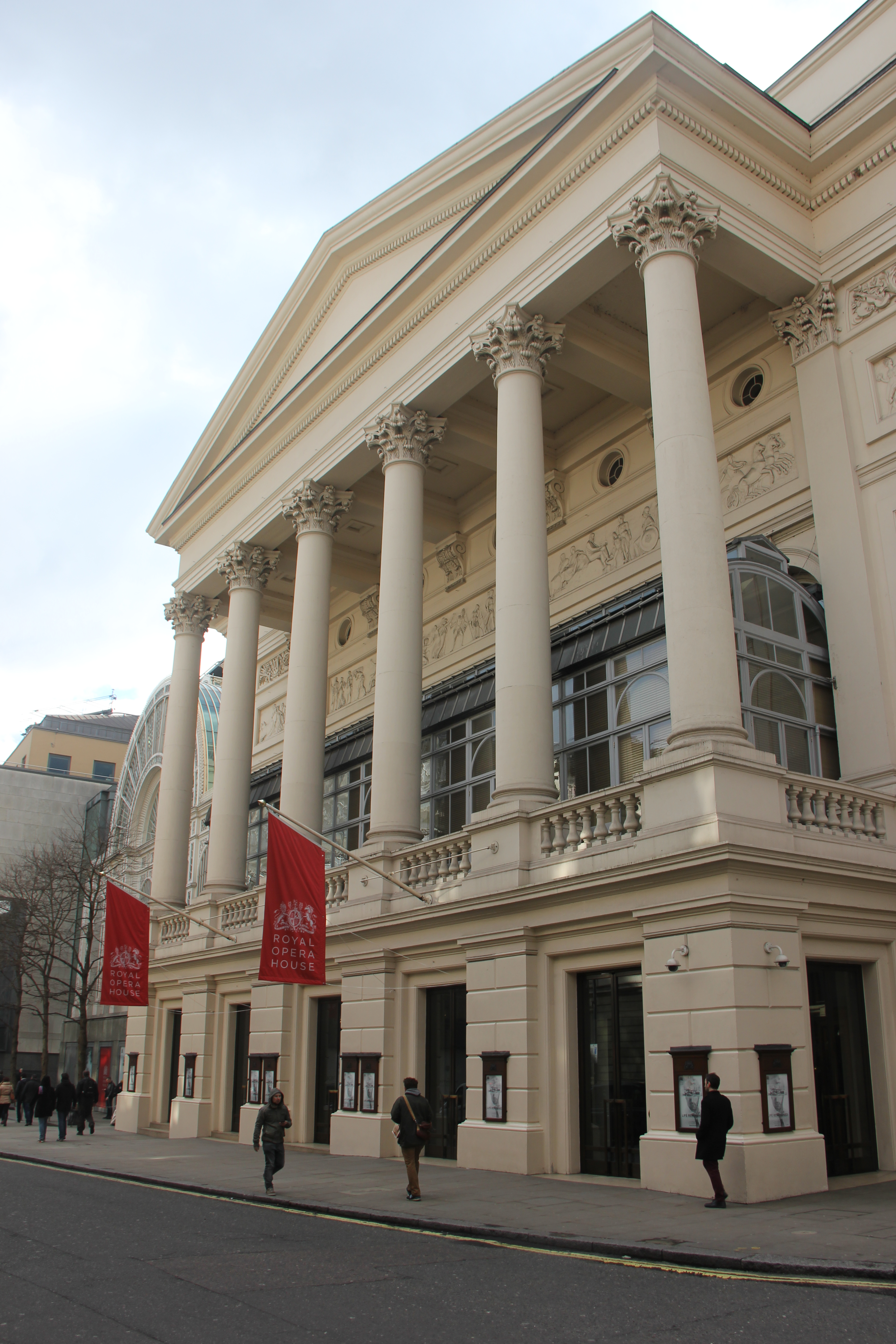 Went to see Swan Lake.